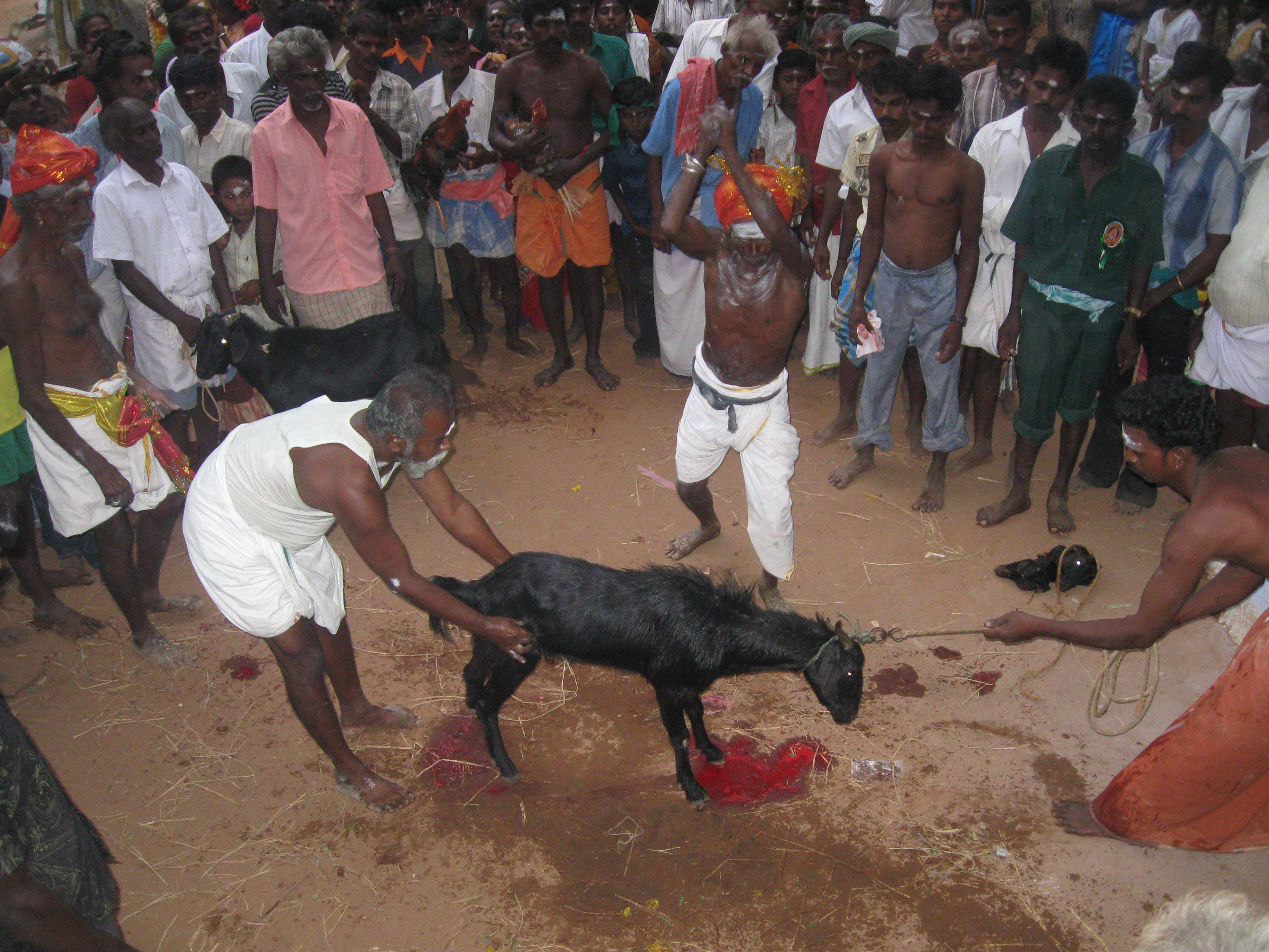 இறைவனுக்கு அளிக்கப் பெறும் பலி/ பலியிடுதல் இன்றும் வழக்கில் உண்டு. ஆடு, மற்றும் கோழிகளை இறைவன் ஆலயத்தின் முன்னால் நிறுத்தி உயிர்ப்பலி கொடுக்கும் ஒரு காட்சி.Goat sacrifice during a hindu Ritual in Tamil Nadu